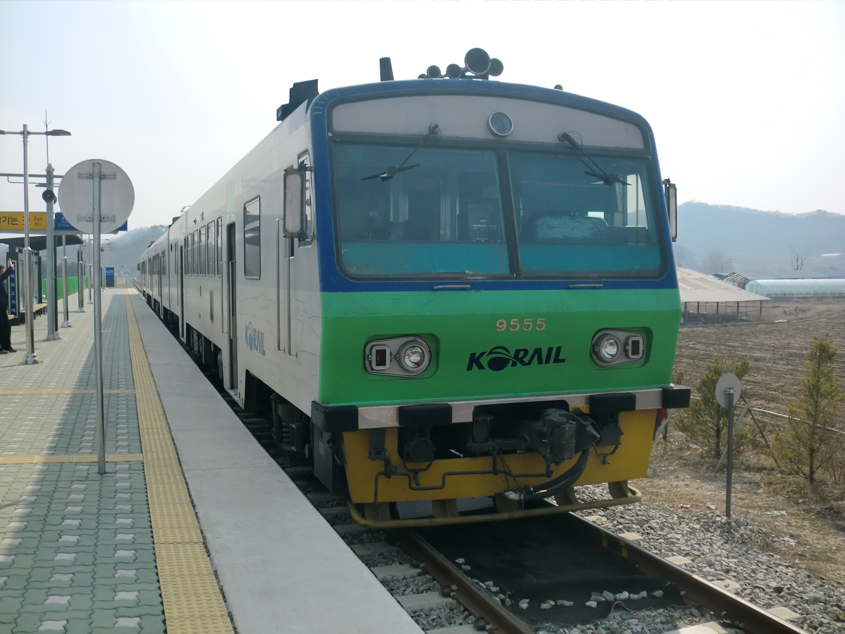 통근열차 (백마고지역에서 촬영)